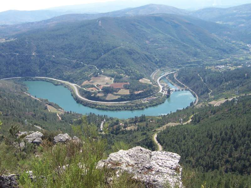 Vista desde A Fraga en la aldea de Roblido (Ourense, Galicia, España)